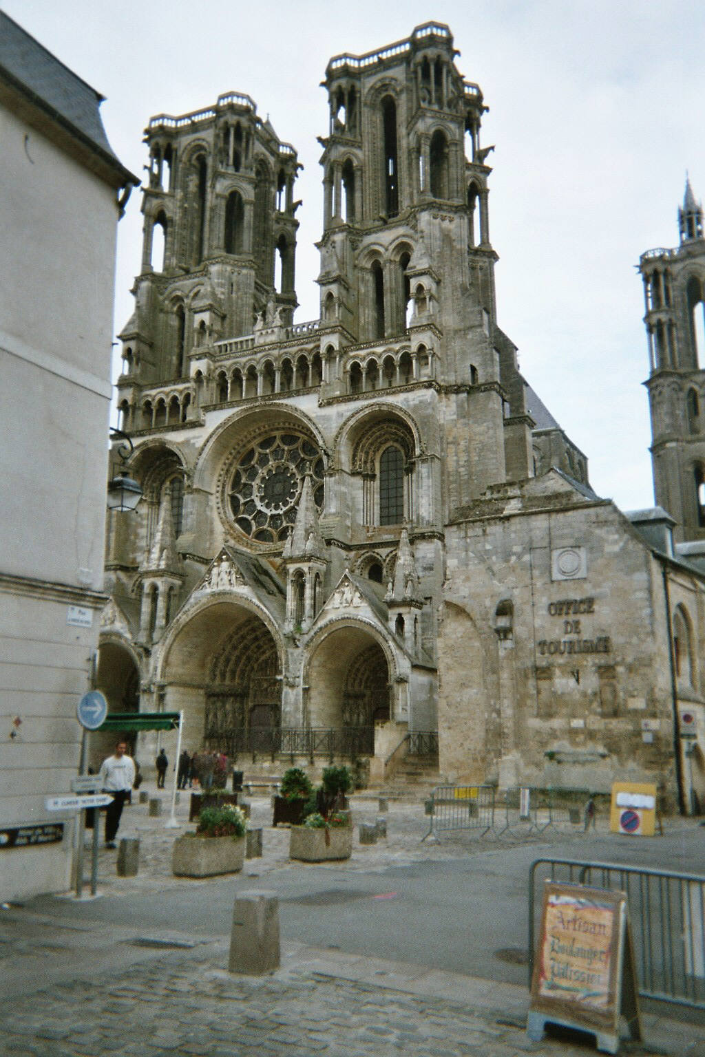 Cathédrale de Laon Aisne 041024 Prise par Mélusin le 041024 - Propriétaire des négatifs. Mélusin